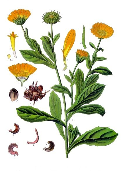 Ringelblume. A Blühende Pflanze. 1 Blütenkopf im Durchschnitt; 2 Blatt des Hüllkelches; 3 weibliche Randblüte; 4 Scheibenblüte; 4a Narbe der Scheibenblüte; 5 Fruchtkörbchen; 6 mittleres Früchtchen, Bauchseite; 7 inneres Früchtchen, Seitenansicht; 8 äusseres Früchtchen, Seitenansicht; 9 mittleres Früchtchen, Seitenansicht; 10 mittleres Früchtchen im Längsschnitt.